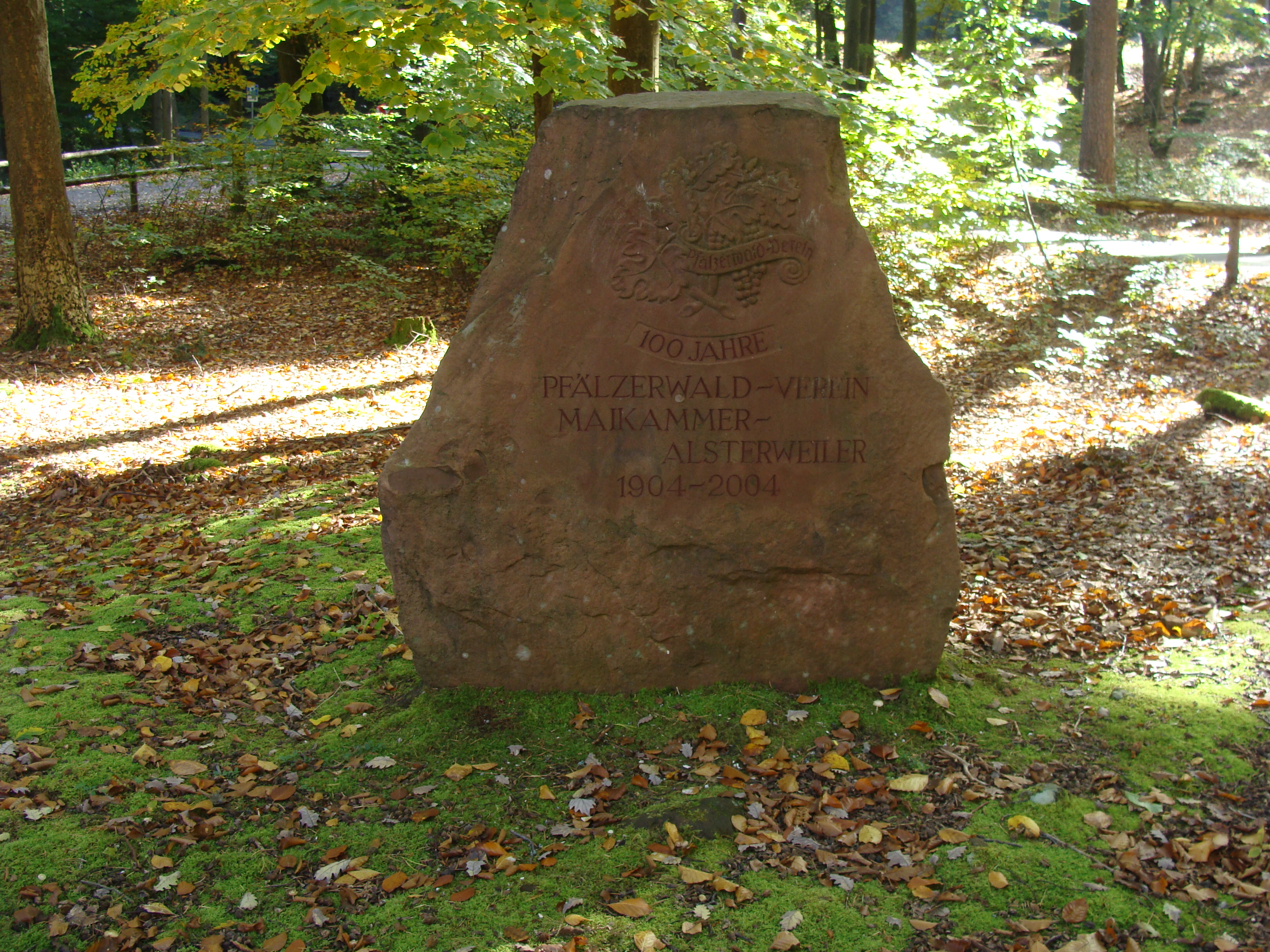 Jubiläumsstein an der Totenkopfhütte des Ortsverbands Maikammer des Pfälzerwaldvereins